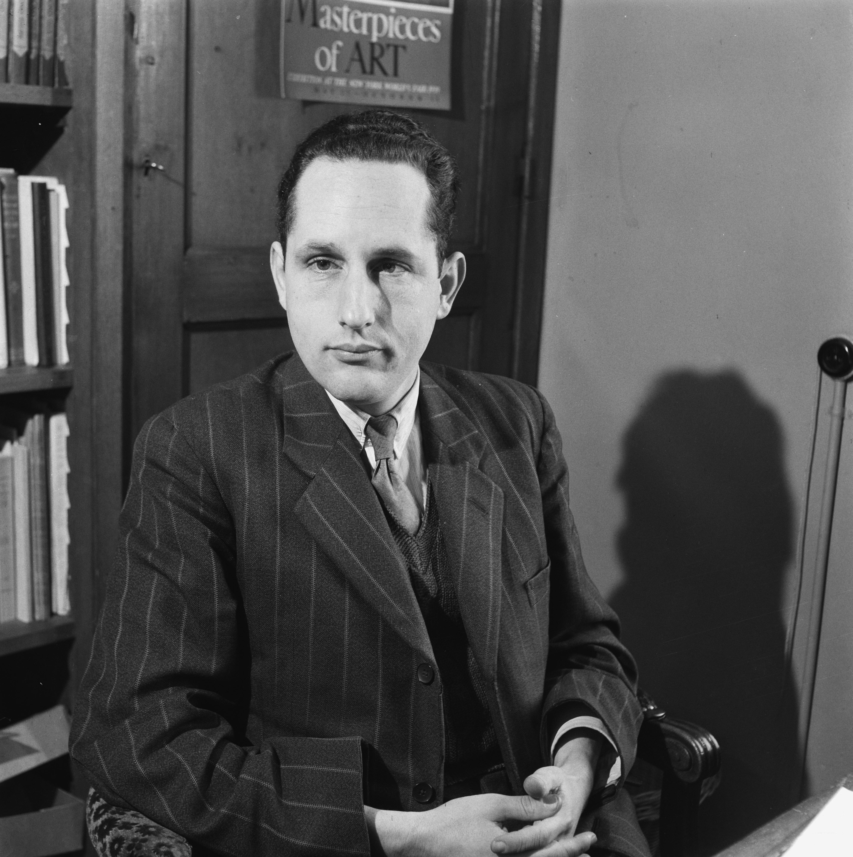 Collectie / Archief : Fotocollectie Anefo Reportage / Serie : [ onbekend ] Beschrijving : dr. Schendel conservator Rijksmuseum Datum : 1945 Locatie : Amsterdam Trefwoorden : portretten Persoonsnaam : Schendel. [...] Fotograaf : Fotograaf Onbekend / Anefo Auteursrechthebbende : Nationaal Archief Materiaalsoort : Negatief (zwart/wit) Nummer archiefinventaris : bekijk toegang 2.24.01.03 Bestanddeelnummer : 900-8827